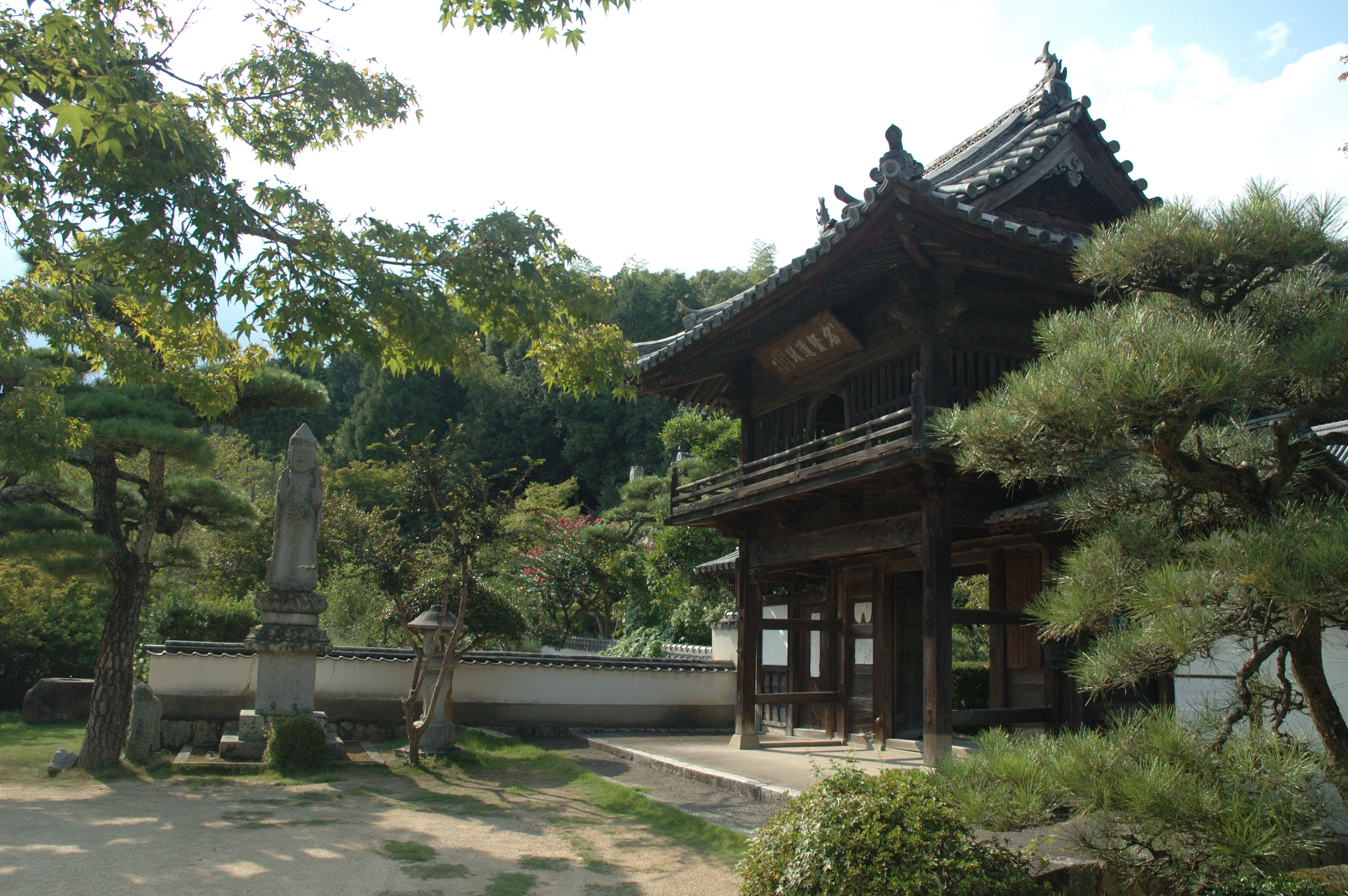 San-mon gate